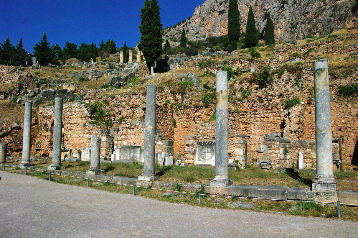 Delphi, römische Agora